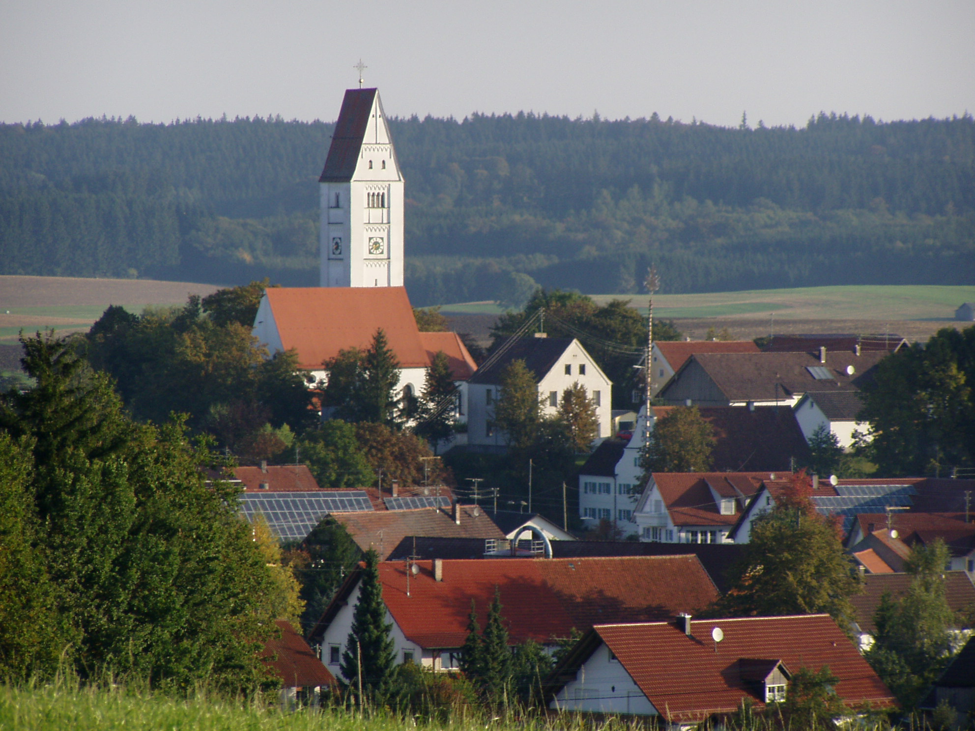 Eppishausen, Mittelschwaben